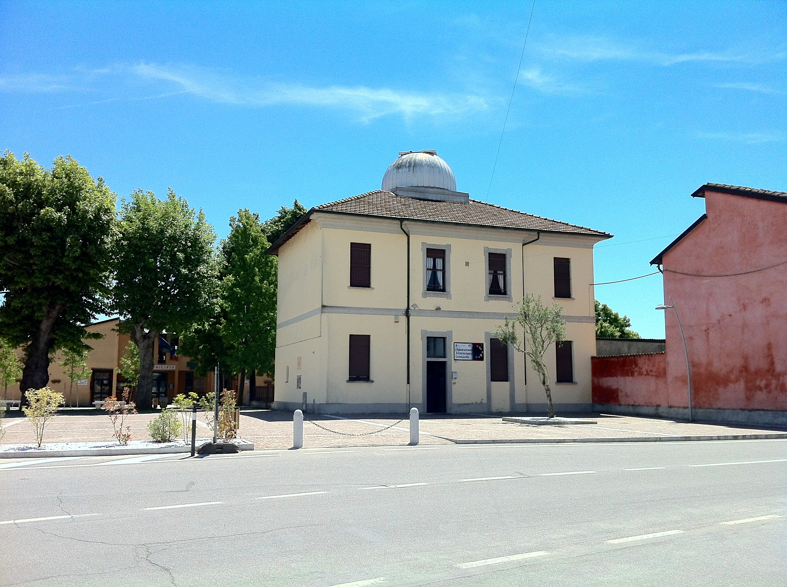 Veduta anteriore dell'Osservatorio astronomico lodigiano a Mairago (LO)